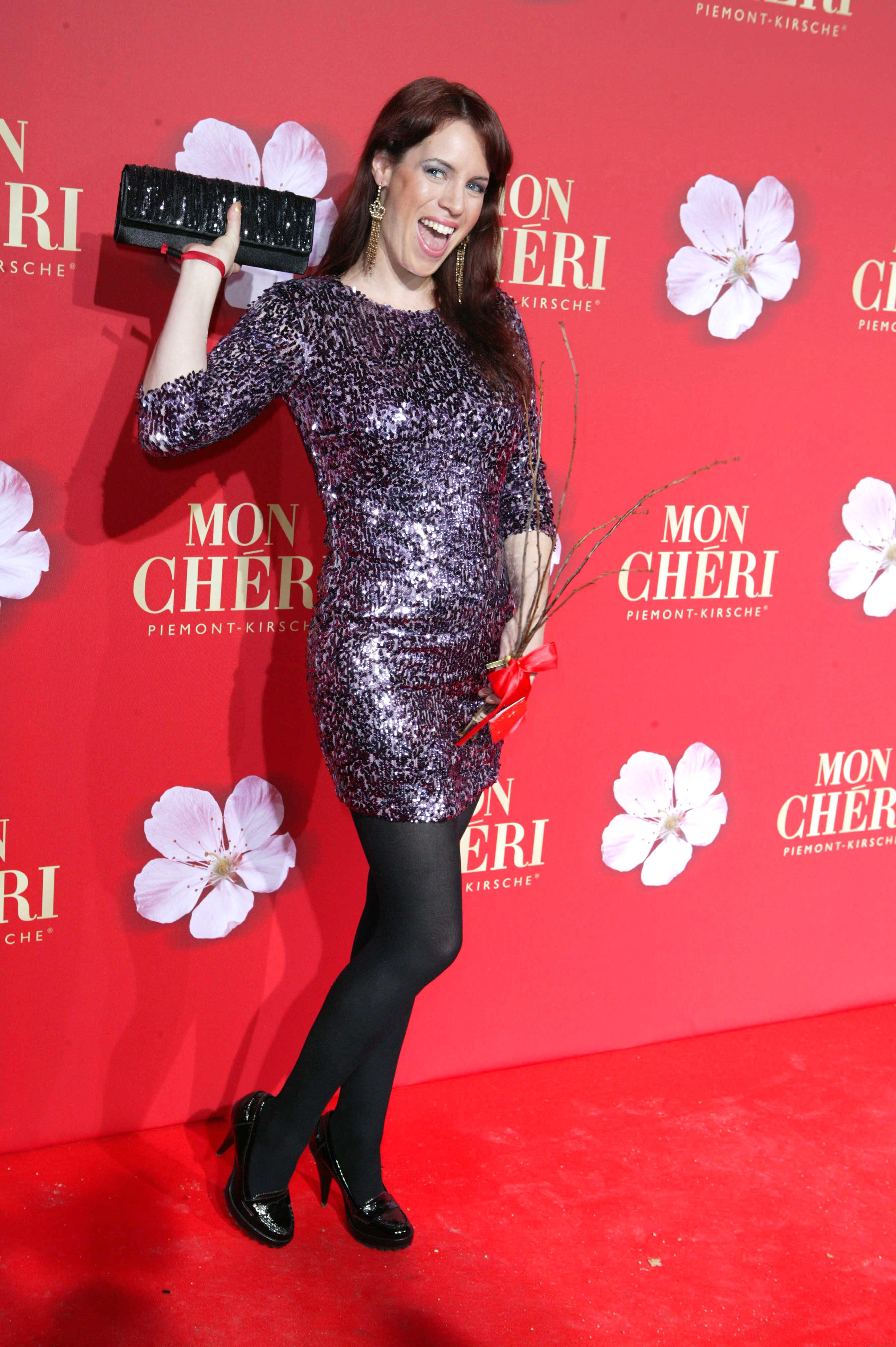 Roter Teppich Event